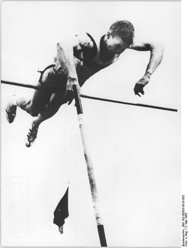 Brian Sternberg Zentralbild AP 3.5.63 Stabhochsprung-Weltrekord wurde schnell überboten Die weltbesten Stabhochspringer "klettern" immer höher: Der von Brian Sternberg am 27.4.63 in Philadelphia (USA) aufgestellte Weltrekord mit 5,00 m wurde bereits 30.4.63 von John Pennel (beide USA) in Monroe mit einer Leistung von 5.048 m überboten. UBz: Brian Sternberg bei seinem Sprung.